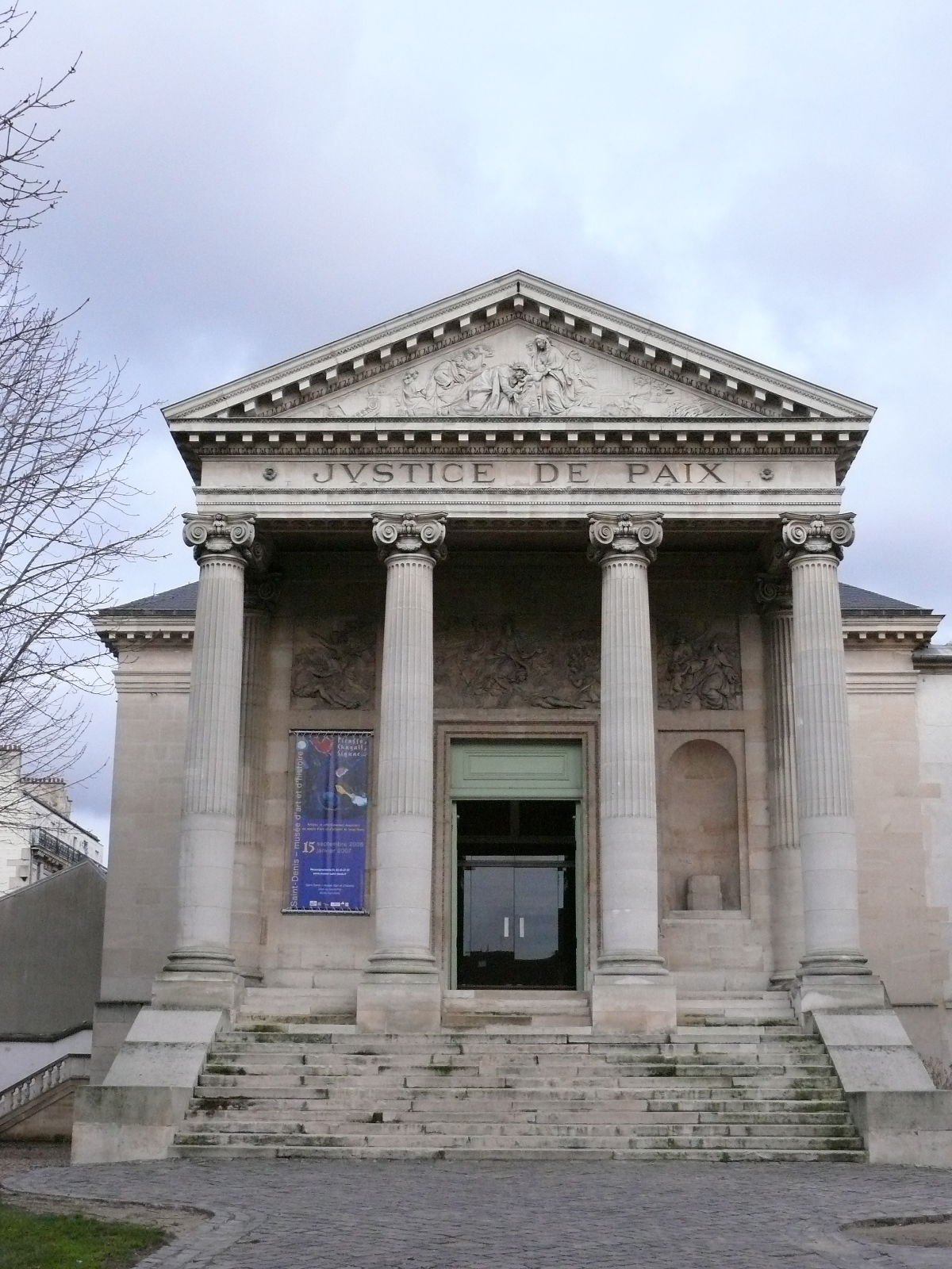 Chapelle du Carmel de Saint-Denis, Seine-Saint-Denis conçue par Richard Mique et achevée en 1784. Restaurée par la municipalité, elle fait partie du Musée d'Art et d'Histoire de Saint-Denis